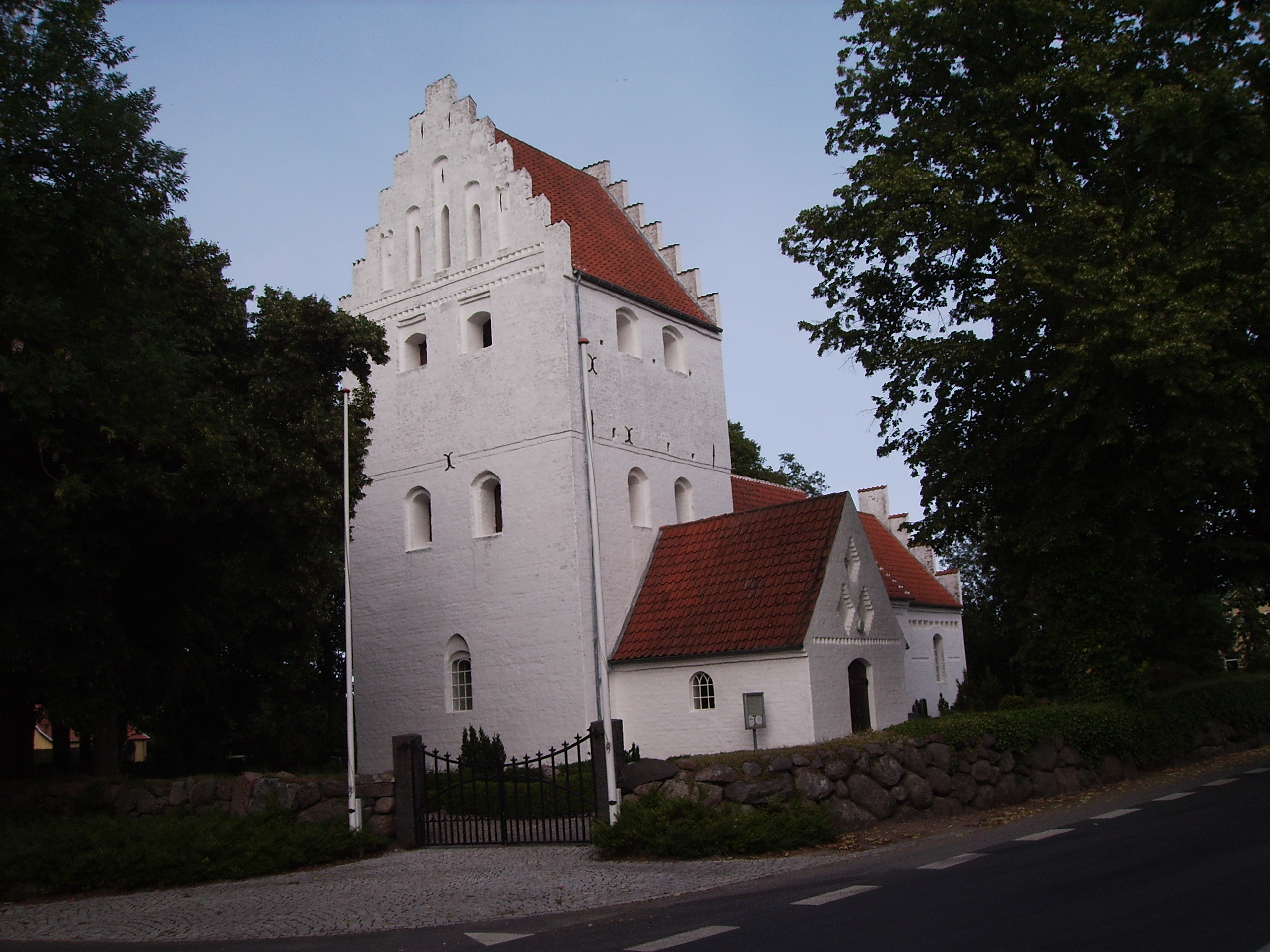 Birkende Kirke, Birkende Sogn, Bjerge Herred, Odense Amt, Denmark (Danish Church) Date: 27.07.2006 Photographed by Søren Møller